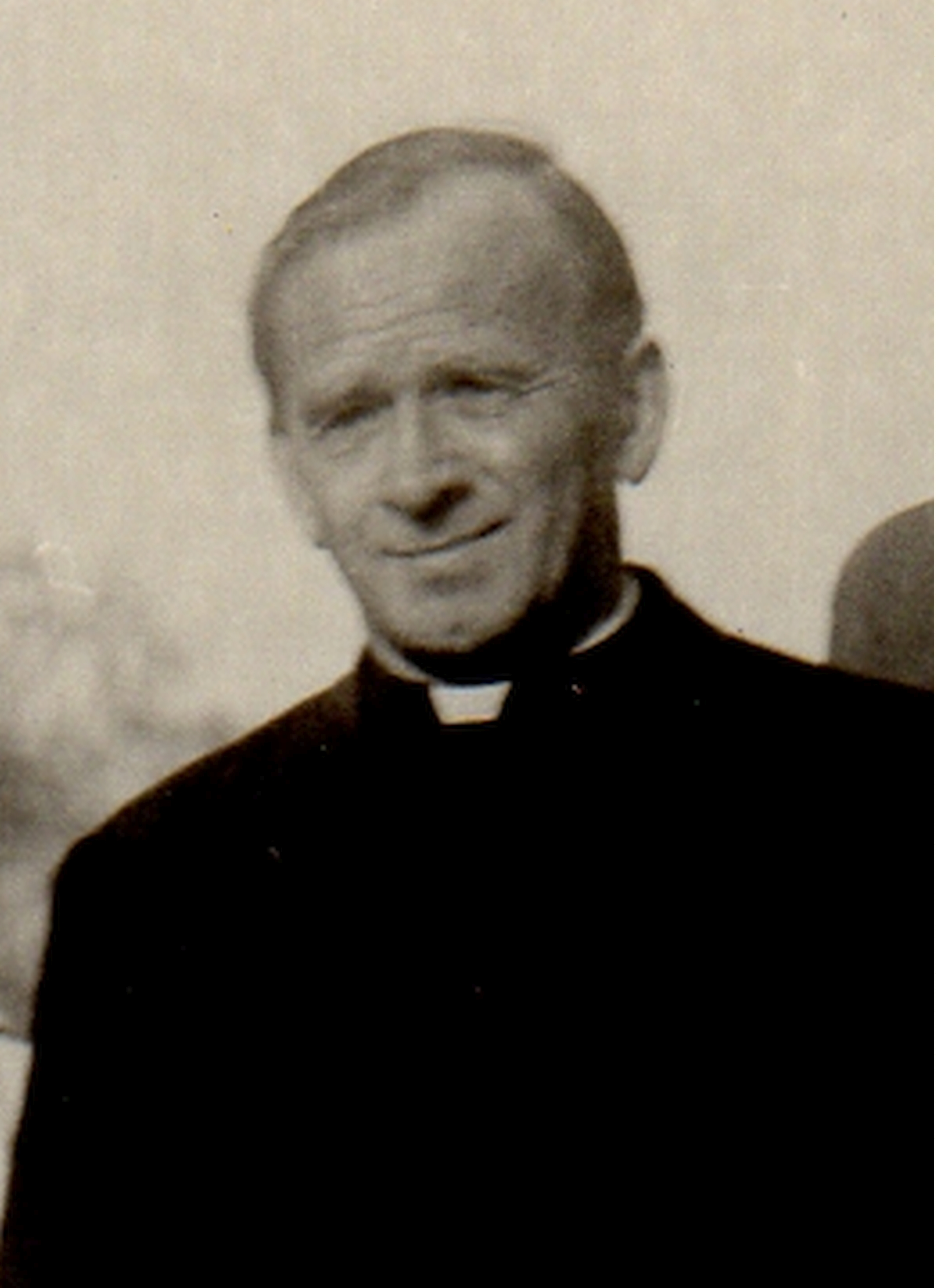 R.D. Rudolf Sitte v roce 1963